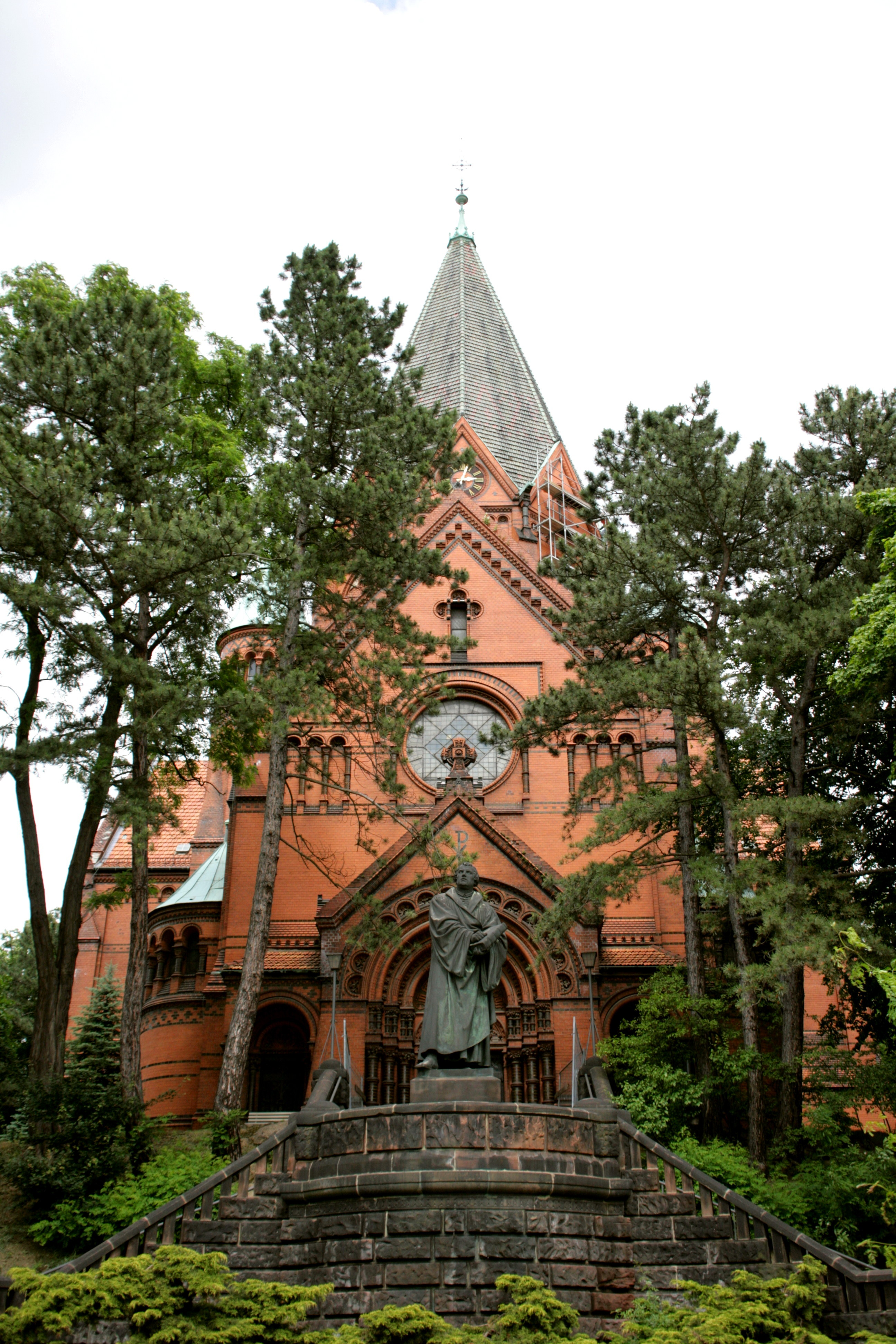 Lutherkirche am Lutherplatz in Görlitz